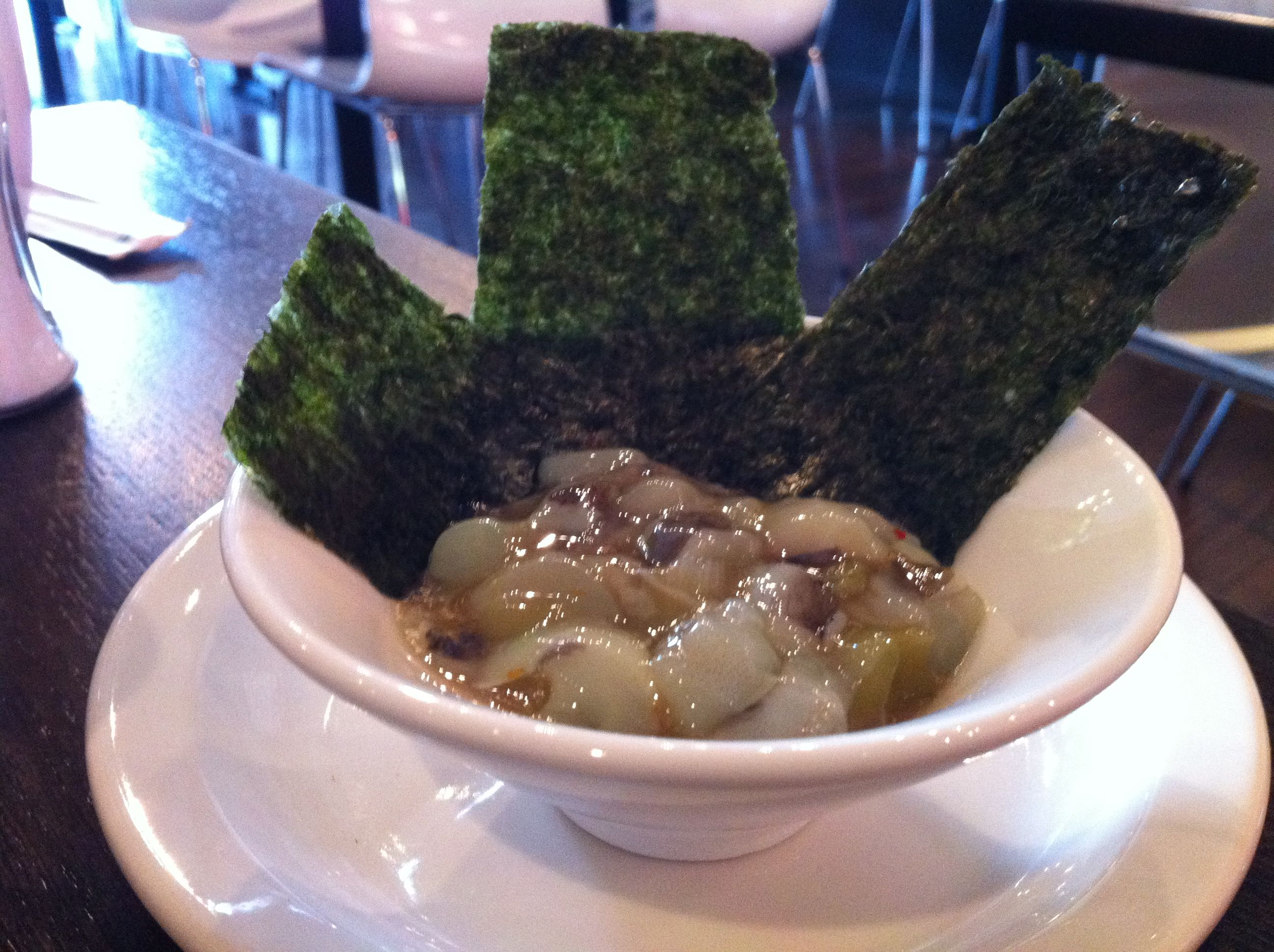 Sama Zama 425 Westport Rd. Kansas City, MO 64111